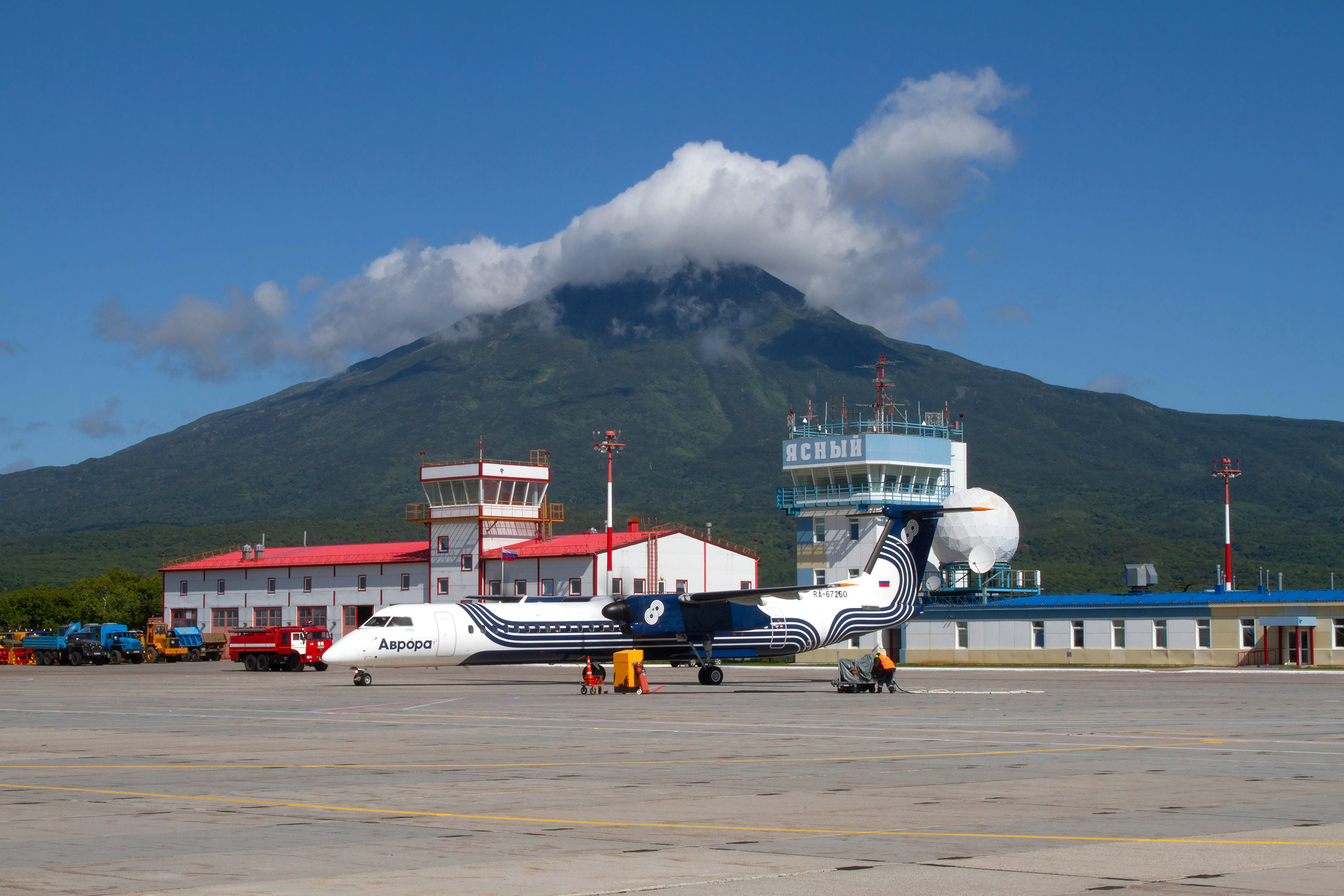 Самолет авиакомпании "Аврора" в аэропорту "Ясный", остров Итуруп, Россия